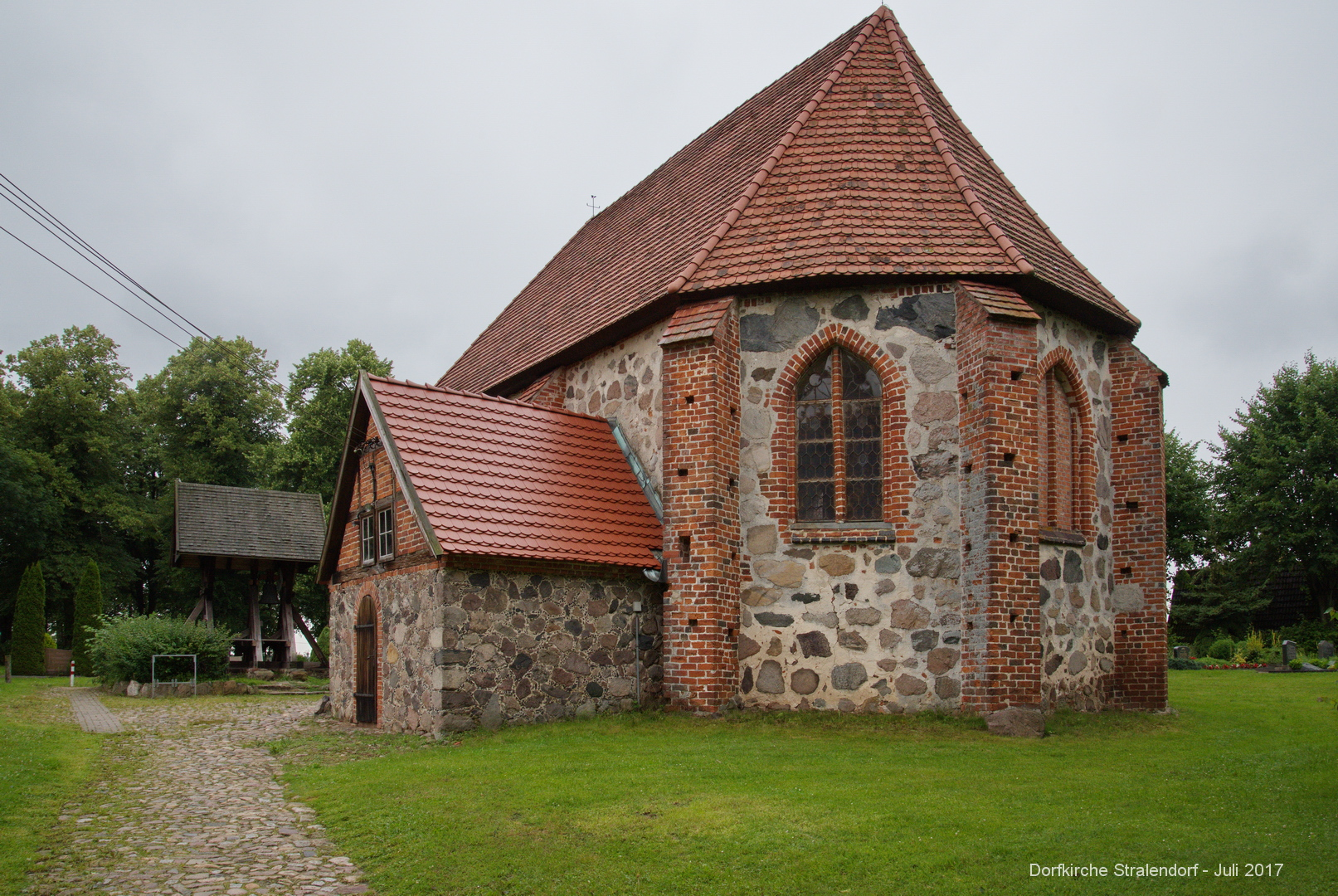 Stralendorf - Dorfkirche mit separatem Glockenturm